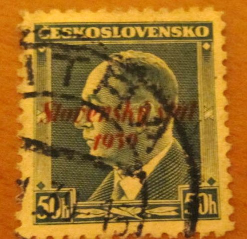 Poštová známka Slovenský štát, pretlač na československej známke, rok 1939, portrét Edvard Beneš, hodnota 50 halierov Unknown